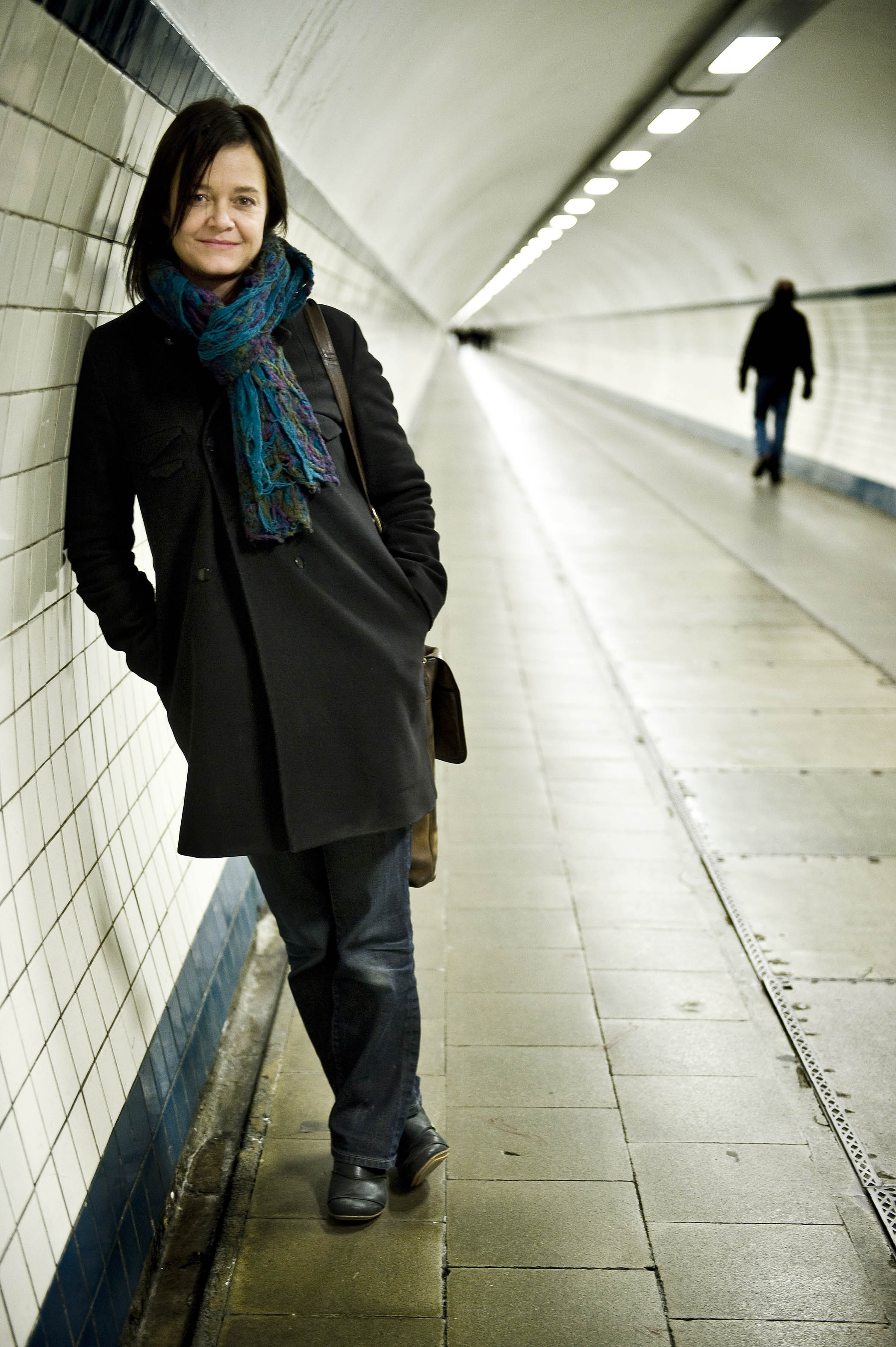 Inge Heremans (Ilah), Belgisch striptekenaar.